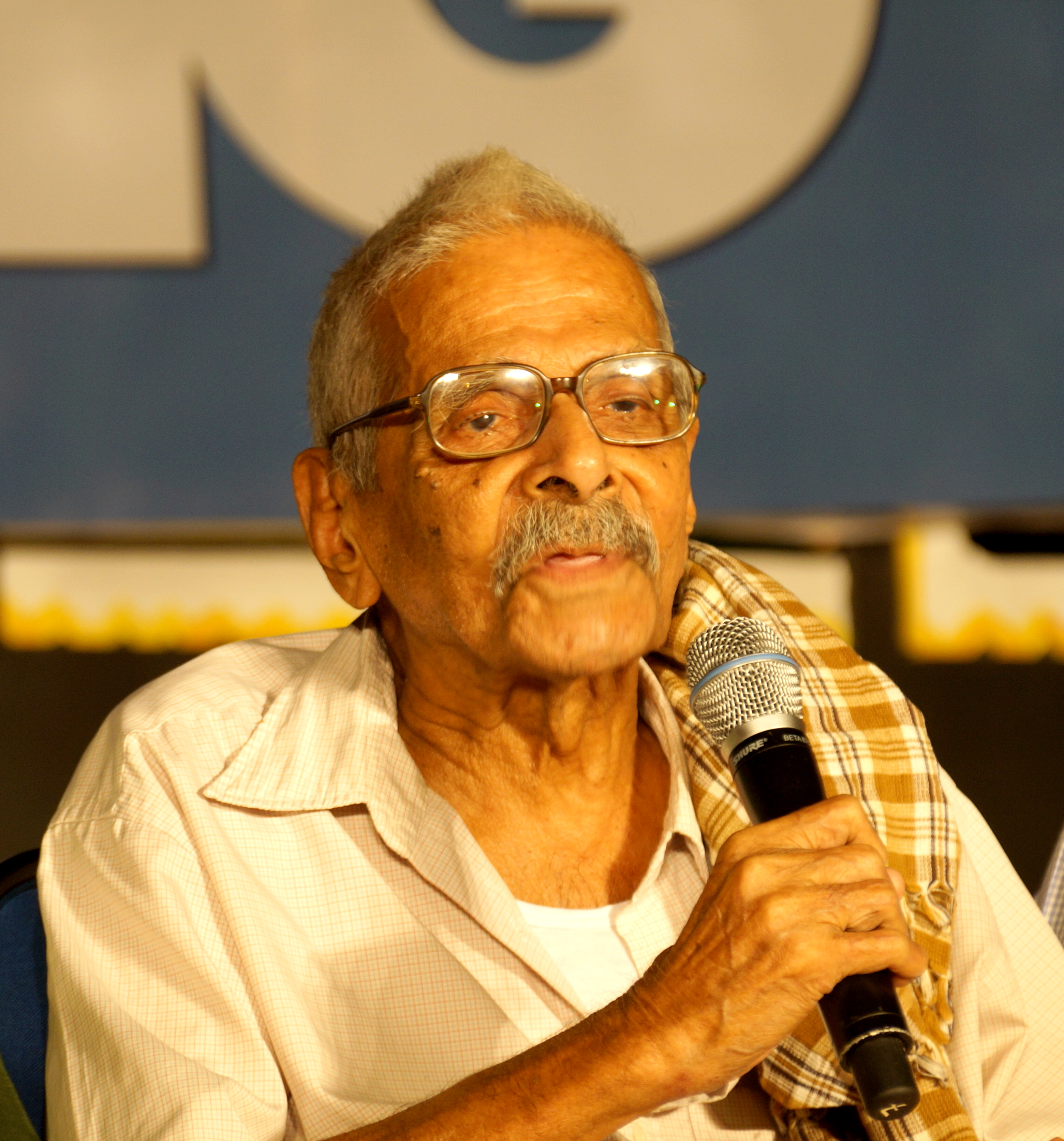 പ്രമുഖ നാടകപ്രവര്‍ത്തകനായിരുന്ന തുപ്പേട്ടന്‍., നാടകരചയിതാവ്.